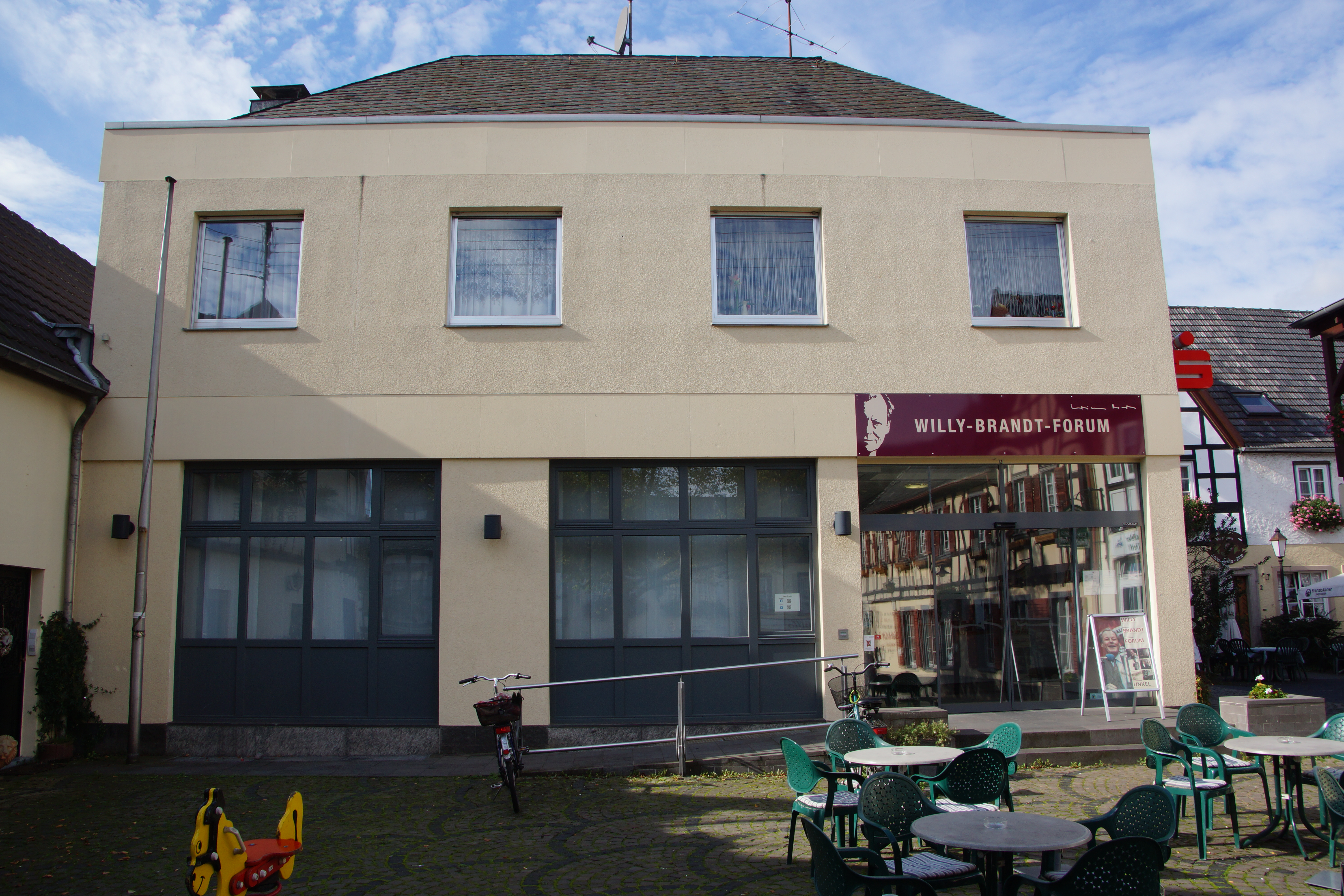 Willy-Brandt-Forum, Willy-Brandt-Platz 5, Unkel